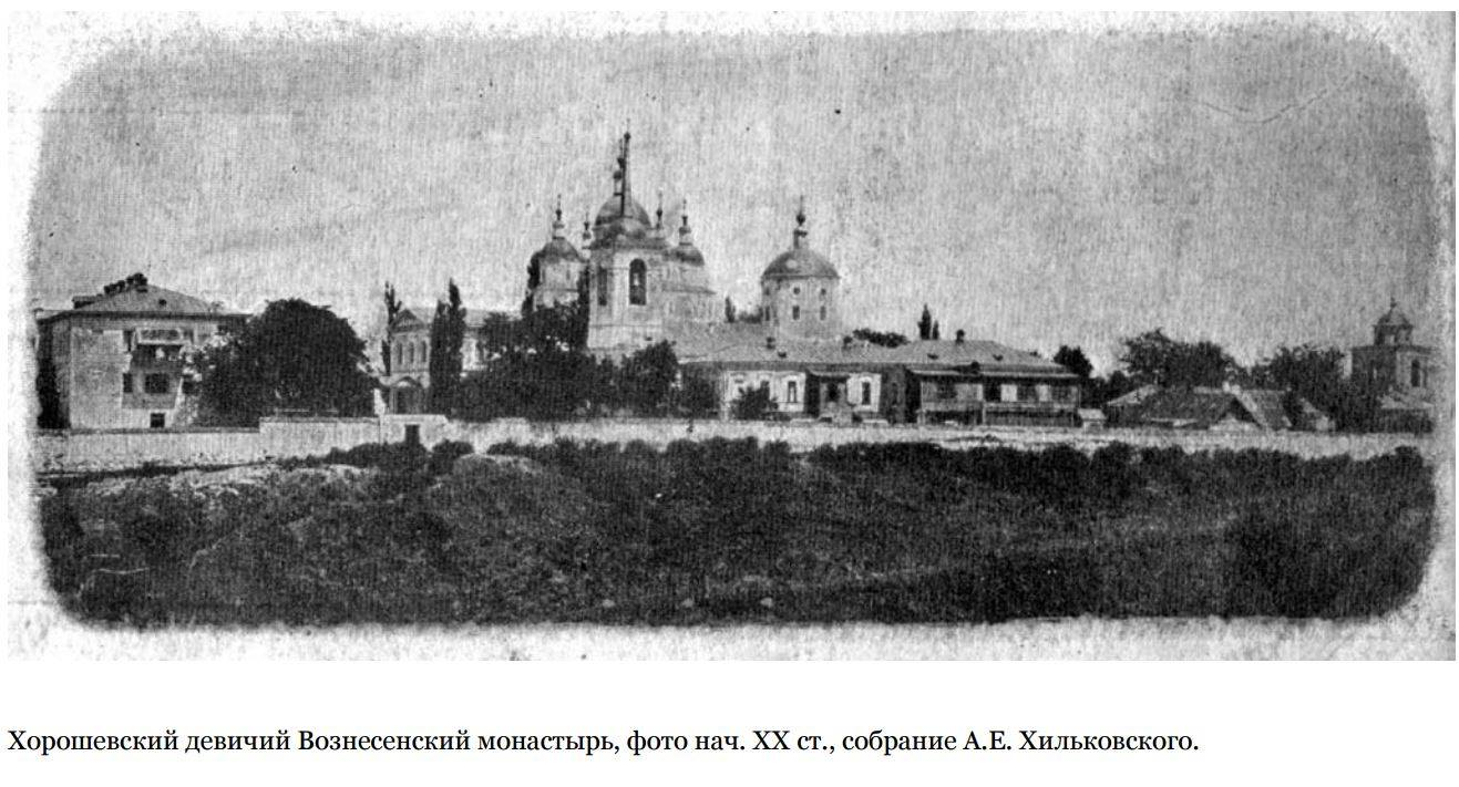 Хорошевский Вознесенский женский монастырь, начало ХХ века